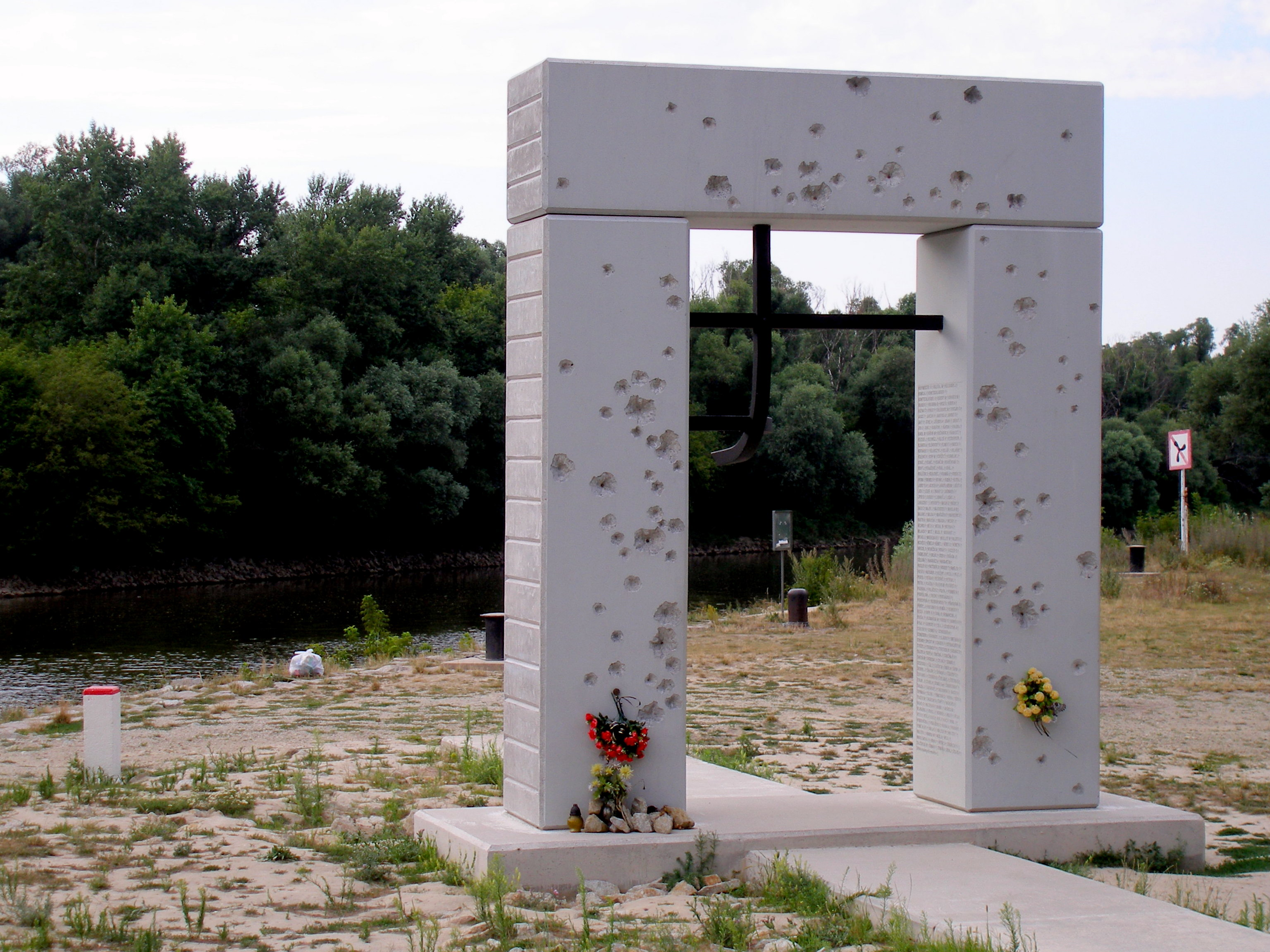 Pamätník obetiam zastreleným do roku 1989 pri pokuse o prechod do Rakúska pod starobylým slovanským hradom Devín, na sútoku riek Dunaj a Morava v mestskej časti mesta Bratislava-Devín